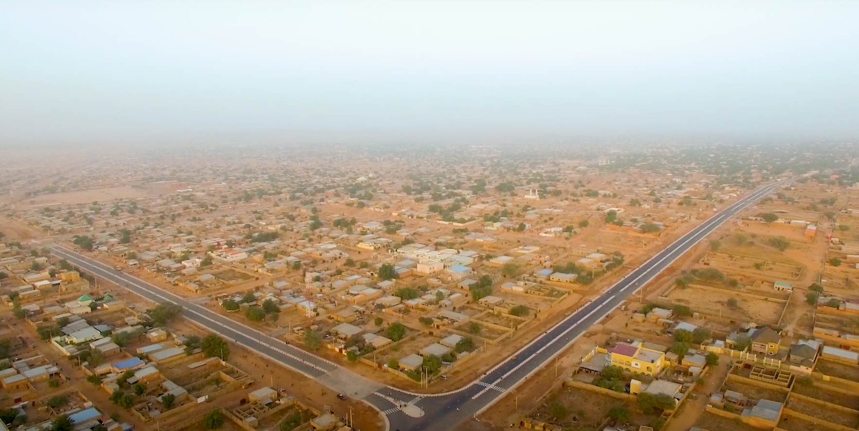 Ville de Zinde vue du ciel